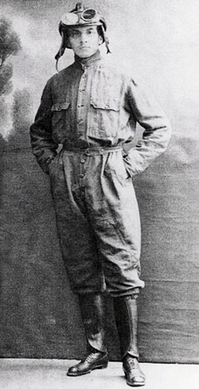 Александр Евгеньевич Раевский (1887—1937) — русский авиатор, один из основоположников отечественного лётного дела.